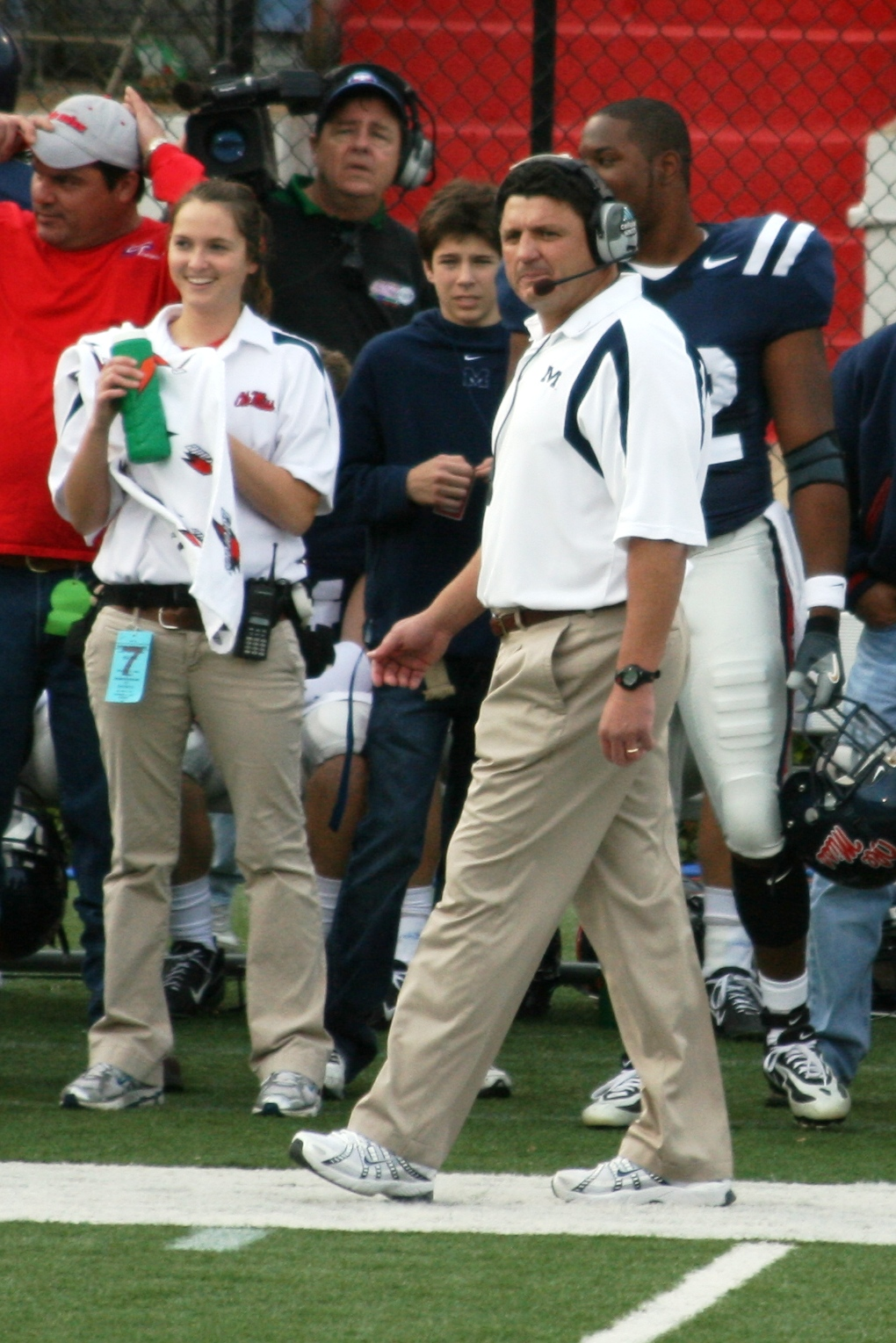 Ole Miss Coach Ed Orgeron